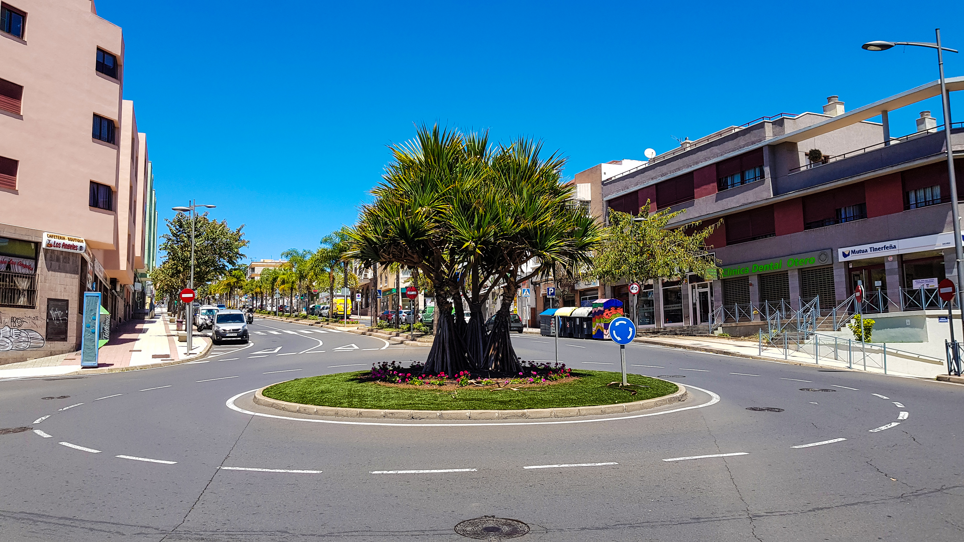 Comiezo de La Cuesta entrando desde Santa Cruz